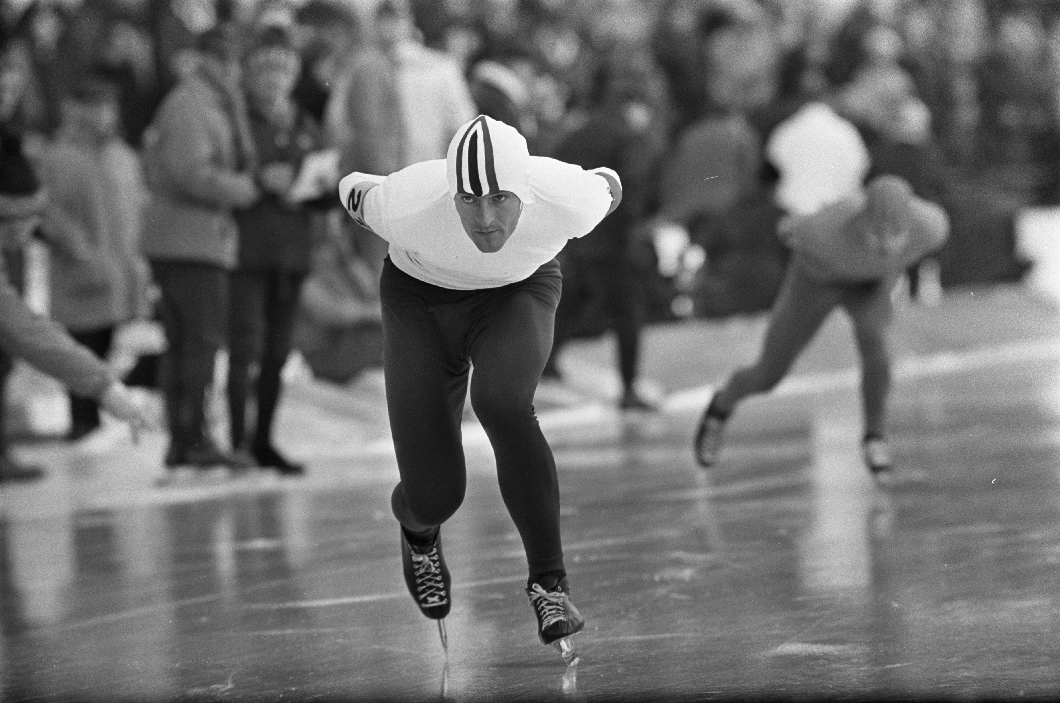 Collectie / Archief : Fotocollectie Anefo Reportage / Serie : [ onbekend ] Beschrijving : WK te Goteborg. CP 10.000m. Verkerk en Maier Datum : 6 maart 1968 Locatie : Göteborg, Zweden Trefwoorden : schaatsen, schaatsen, sport Persoonsnaam : Maier, Fred Anton, Verkerk, Kees Fotograaf : Kroon, Ron / Anefo Auteursrechthebbende : Nationaal Archief Materiaalsoort : Negatief (zwart/wit) Nummer archiefinventaris : bekijk toegang 2.24.01.05 Bestanddeelnummer : 921-1442